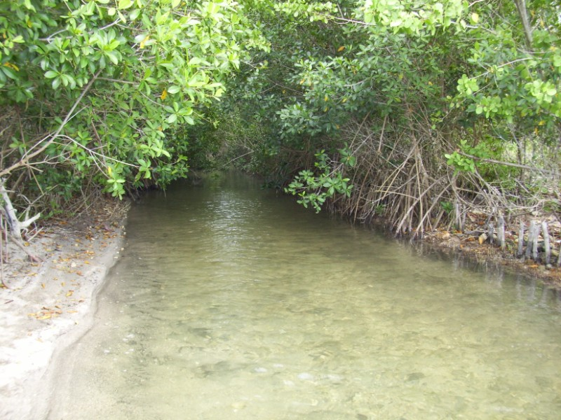 Una de las llamadas Zanjitas de la Playa Mayabeque en Melena del Sur